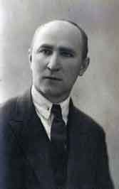 Шкабара Олексій Степанович, керівник Козаровицької дослідно-меліоративної лукової станції, портрет 1950-их років. Фотографія з архіву онуки Шкабари Олексія Степановича, керівника станції з 1925-го року, - Тетяни Свербілової.